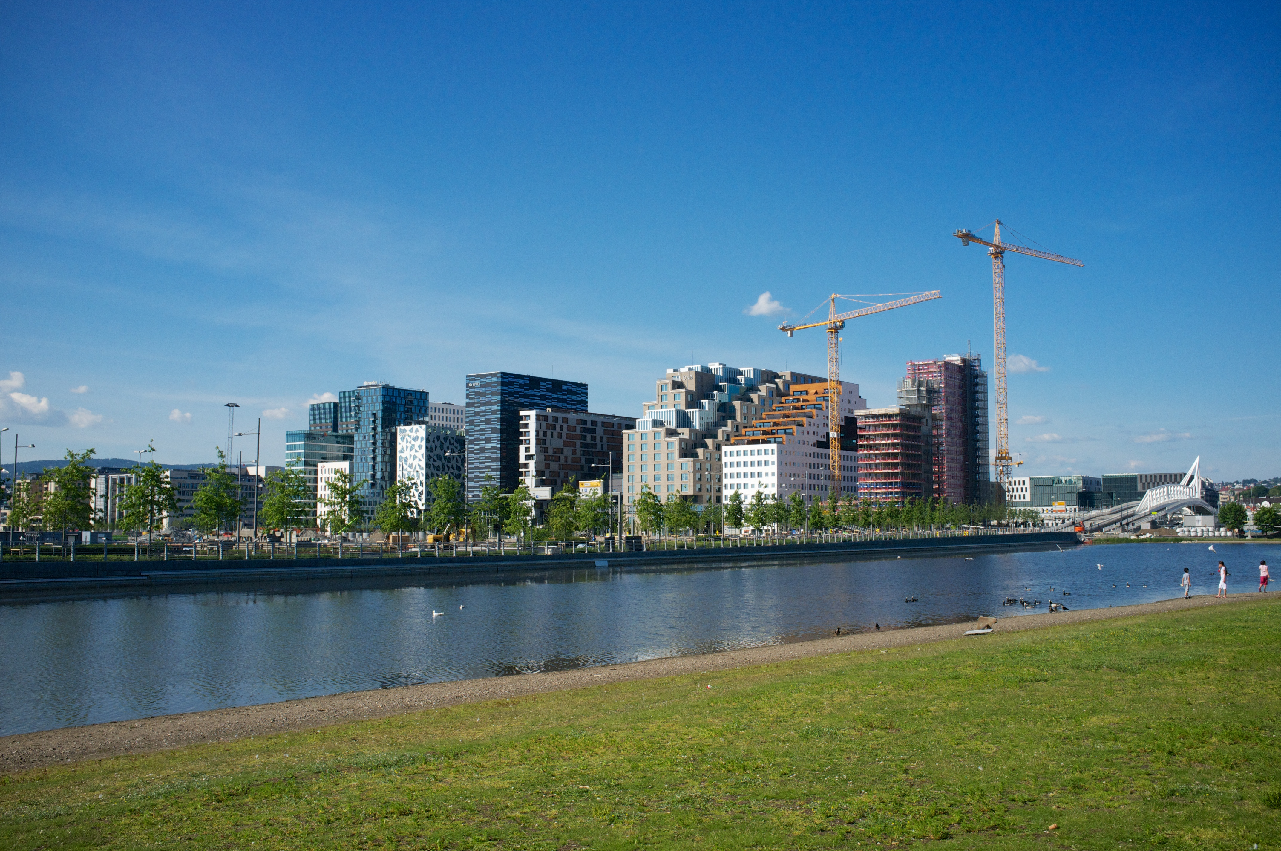 Barcode i Oslo. I forgrunnen: Vannspeilet i Middelalderparken.